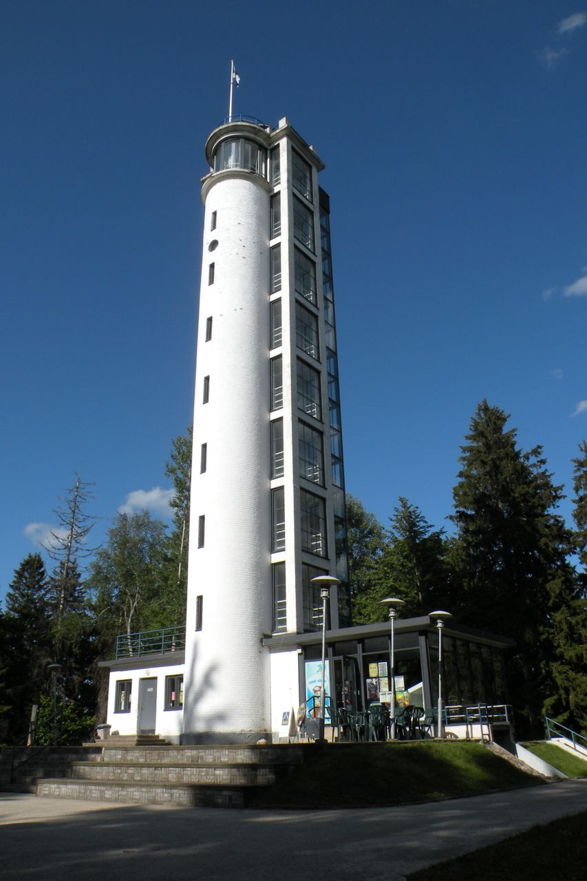 Suure Munamäe vaatetorn